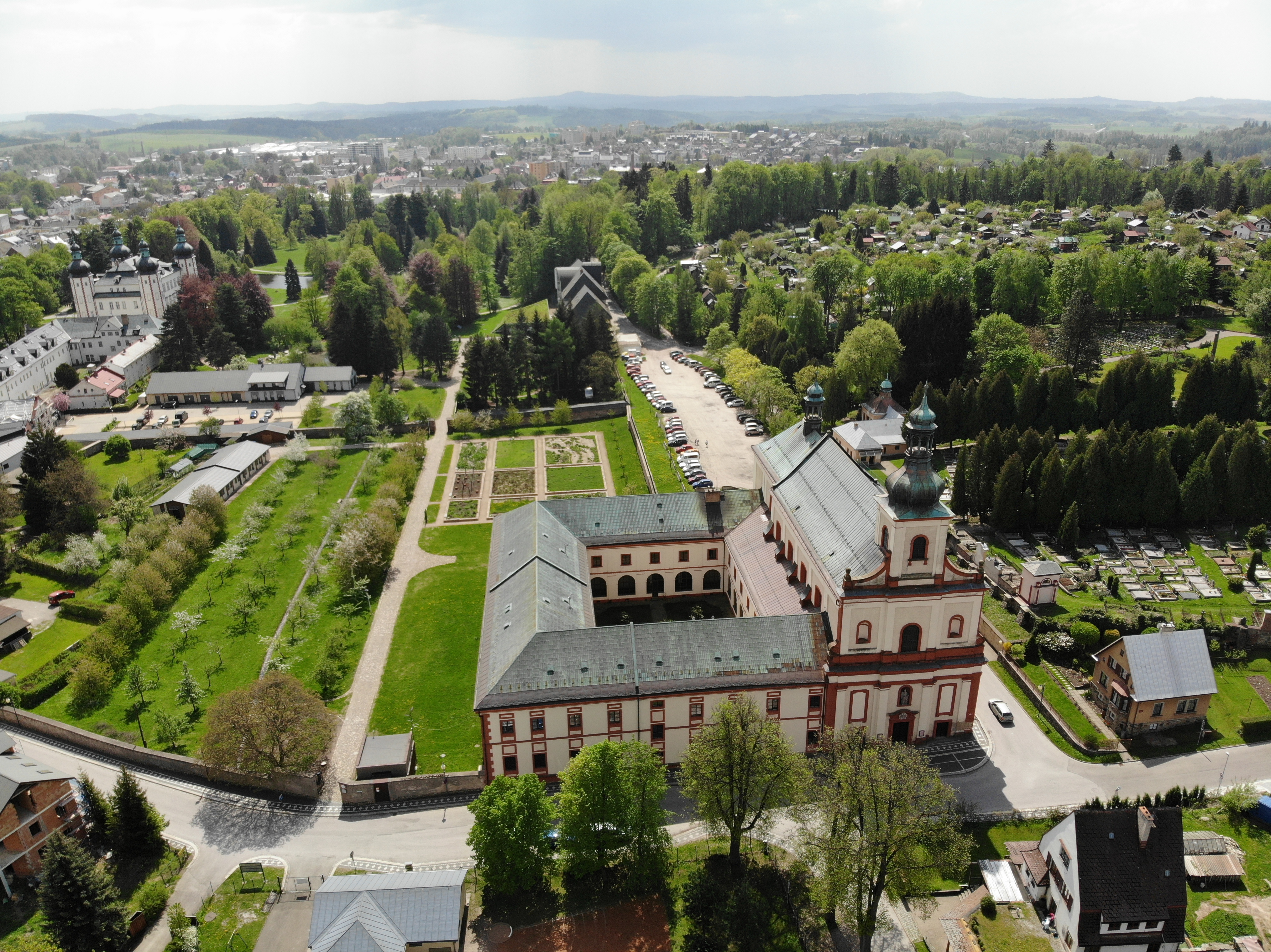 Krkonošské muzeum z ptačí perspektivy Project: Fotíme Česko.